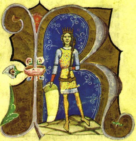 Géza II, king of Hungary